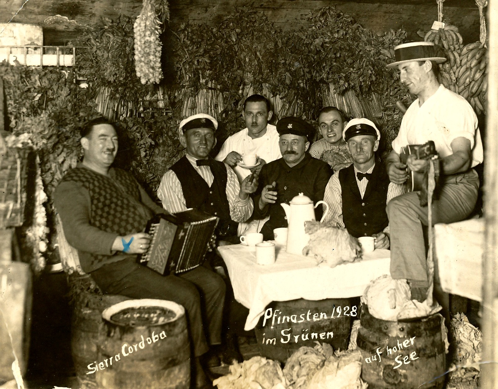 Heinrich Mühlenbeck als Koch auf der Sierra Cordoba, Pfingsten 1928